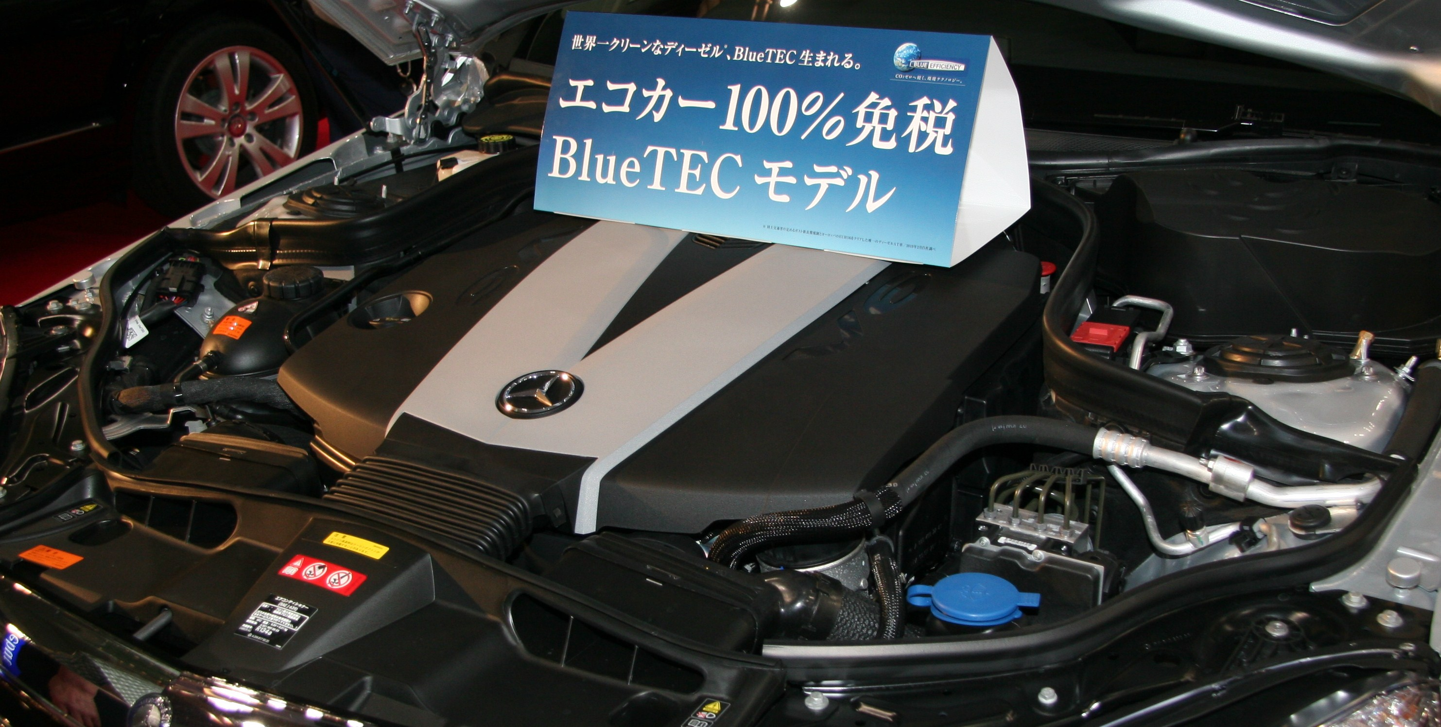 Mercedes-Benz 642 engine